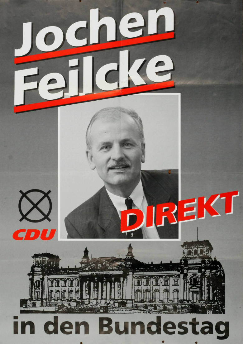 Jochen Feilcke CDU direkt in den Bundestag Abbildung: Porträtfoto - Stimmkreuz - Reichstagsgebäude Plakatart: Kandidaten-/Personenplakat mit Porträt Objekt-Signatur: 10-001 : 4062 Bestand: Plakate zu Bundestagswahlen (10-001) GliederungBestand10-18: Plakate zu Bundestagswahlen (10-001) » Die 13. Bundestagswahl am 16. Oktober 1994 » CDU » Mit Porträtfoto Lizenz: KAS/ACDP 10-001 : 4062 CC-BY-SA 3.0 DE